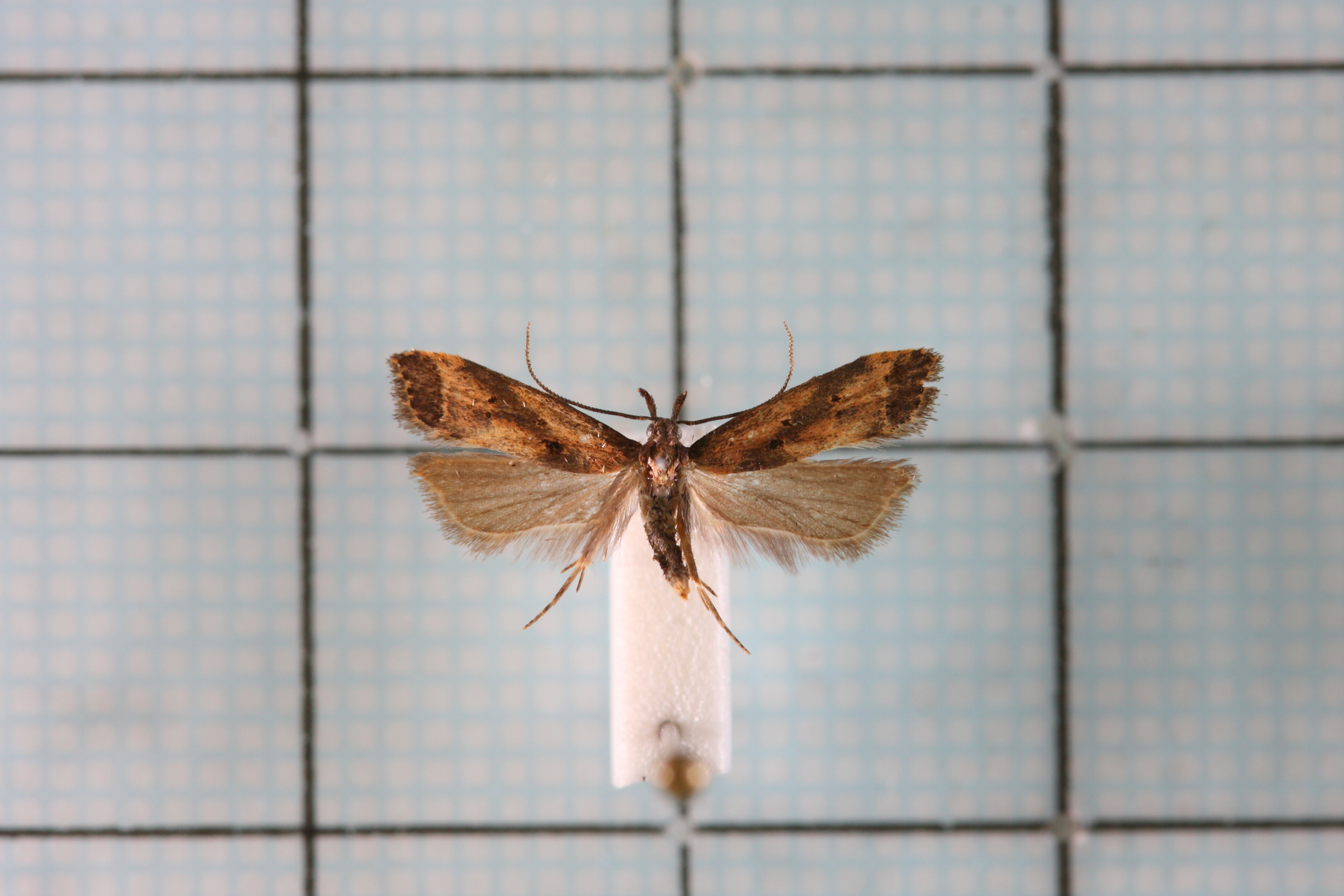 Helcystogramma trijunctum Meyrick, 1934 認識台灣的昆蟲 20 P.98